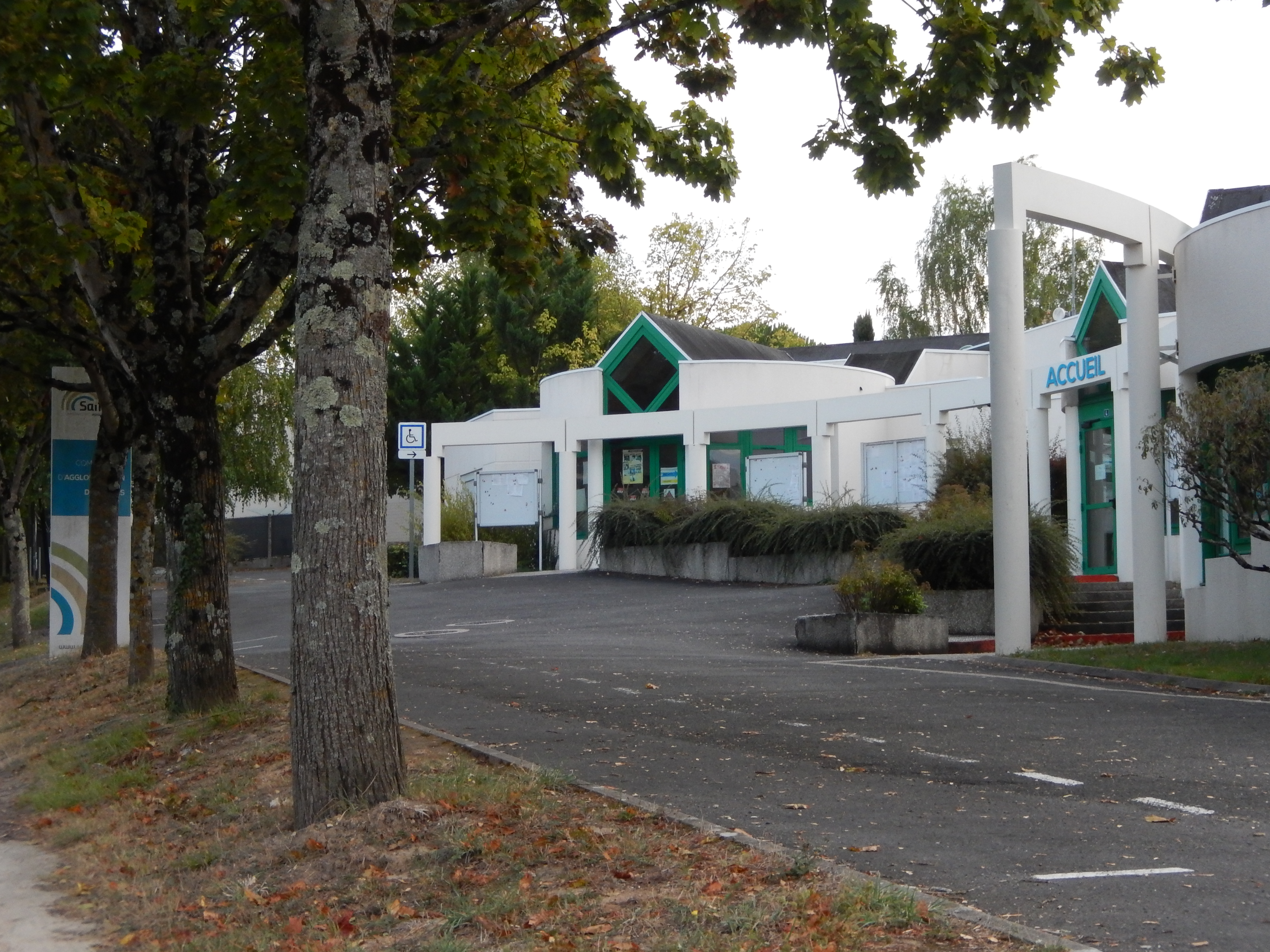 Le siège actuel de la communauté d'agglomération de Saintes, dans l'avenue de Tombouctou.